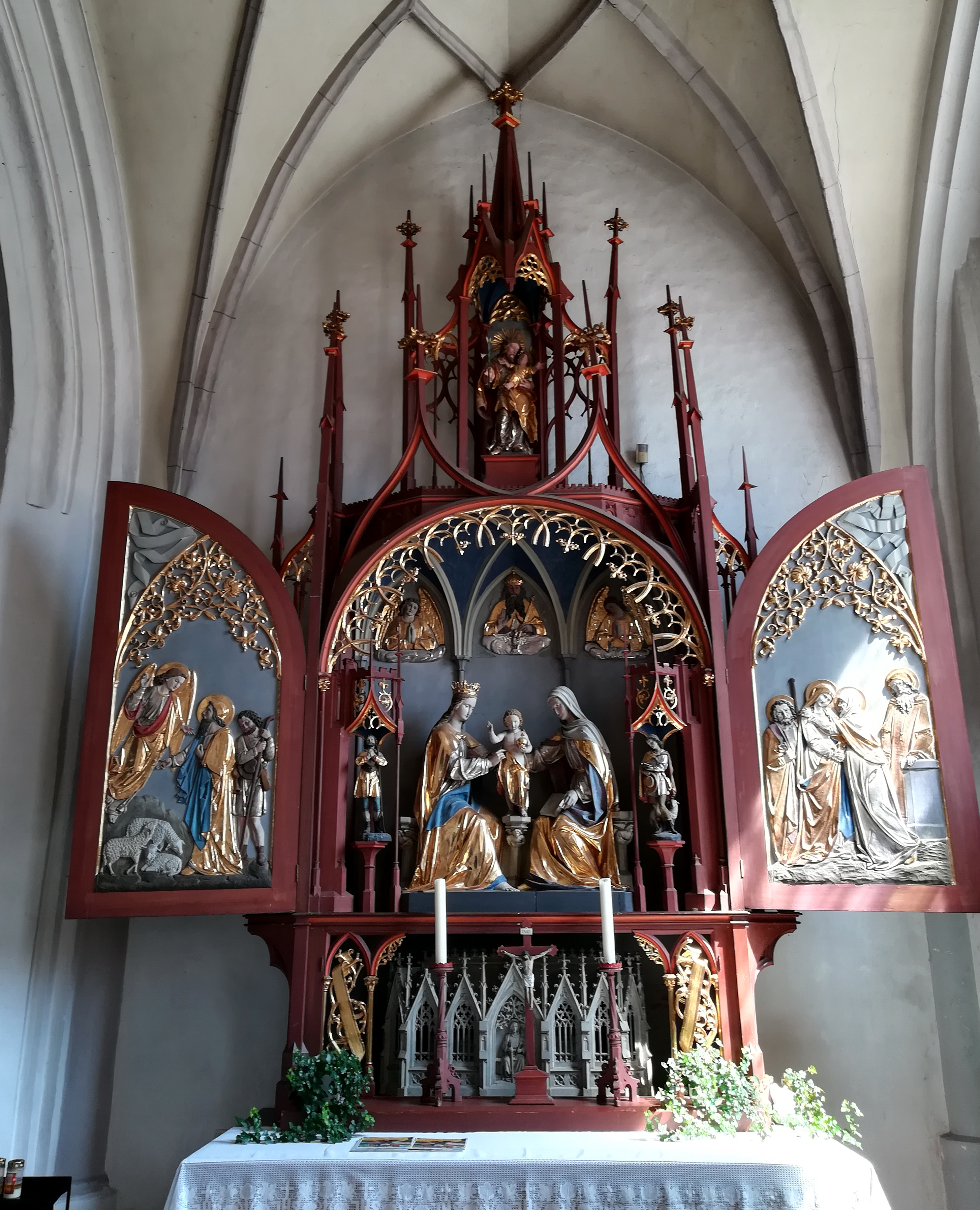 Katholische Pfarrkirche St. Jakob Frontenhausenː Seitenaltar